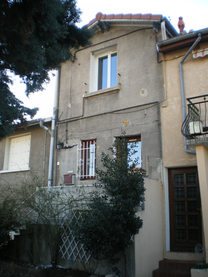 L’ancienne salle de la machine du puits de la Providence, sur la colline du Crêt-de-Roch à Saint-Étienne dans la Loire (France). Transformée depuis longtemps en habitation, elle est le témoin de l’implantation à Saint-Étienne de la Compagnie des Mines de la Loire, vers 1845.